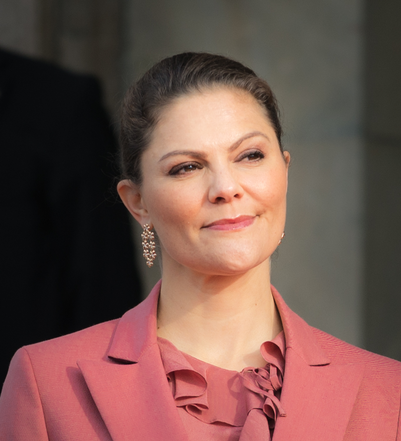 HKH Kronprinsessan under nyinvigningen av Nationalmuseum i Stockholm 2018.